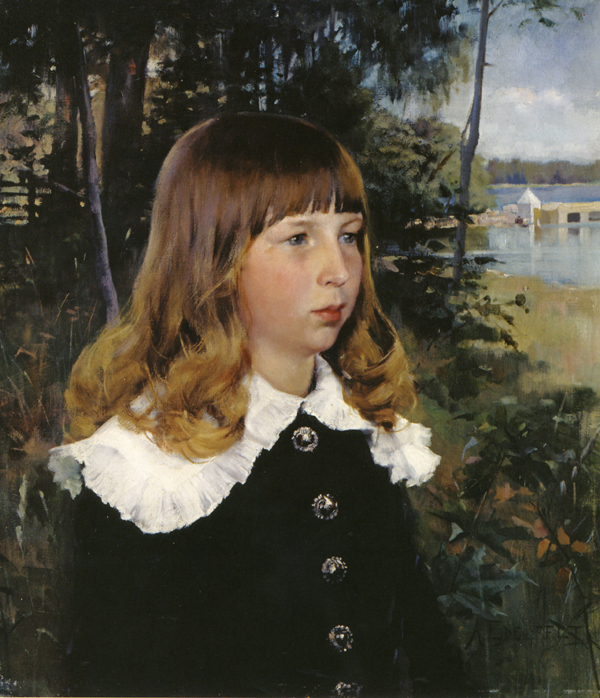 Emelie von Etter. Porträtt av Albert Edelfelt 1880, olja på duk 60x54 cm.